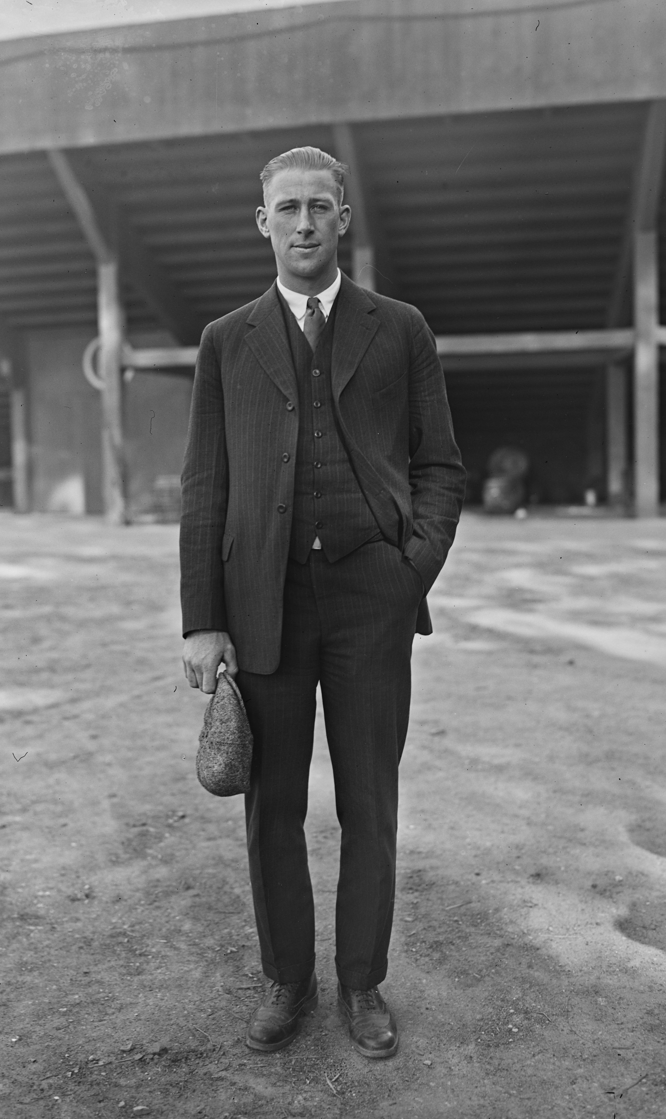 Colby Slater, capitaine de l'équipe [olympique de rugby] U.S., 16/5/24 [stade de Colombes].